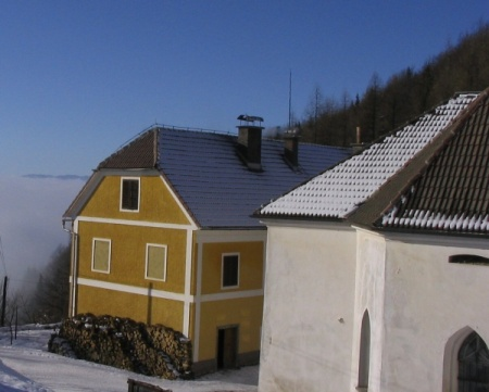 Posnetek Paškega Kozjaka 2007